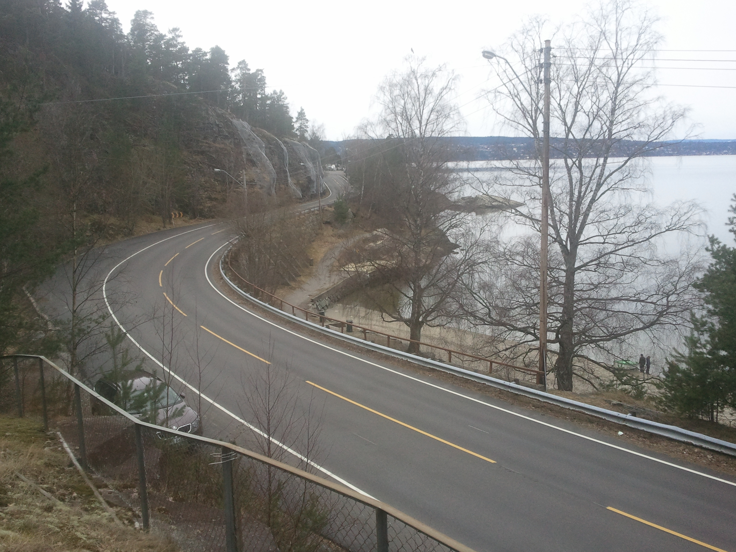 Ljansbrukveien ved Hvervenbukta